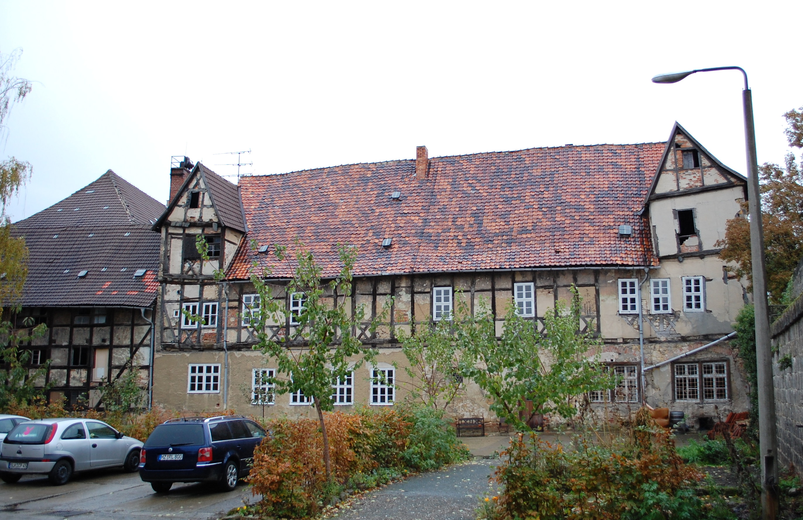 Westteil des Hofs Wordgasse 4 in Quedlinburg, Blick von Westen